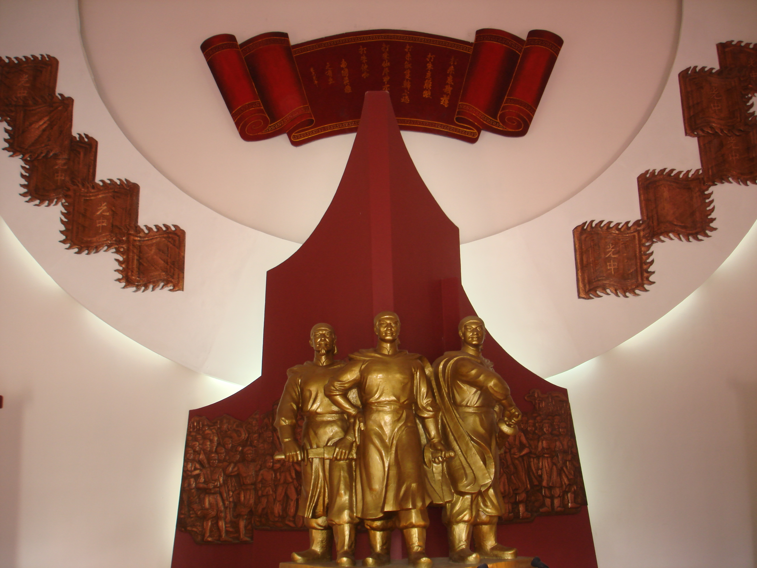 Nguyễn Huệ, Nguyễn Nhạc, Nguyễn Lữ trong bảo tàng Quang Trung